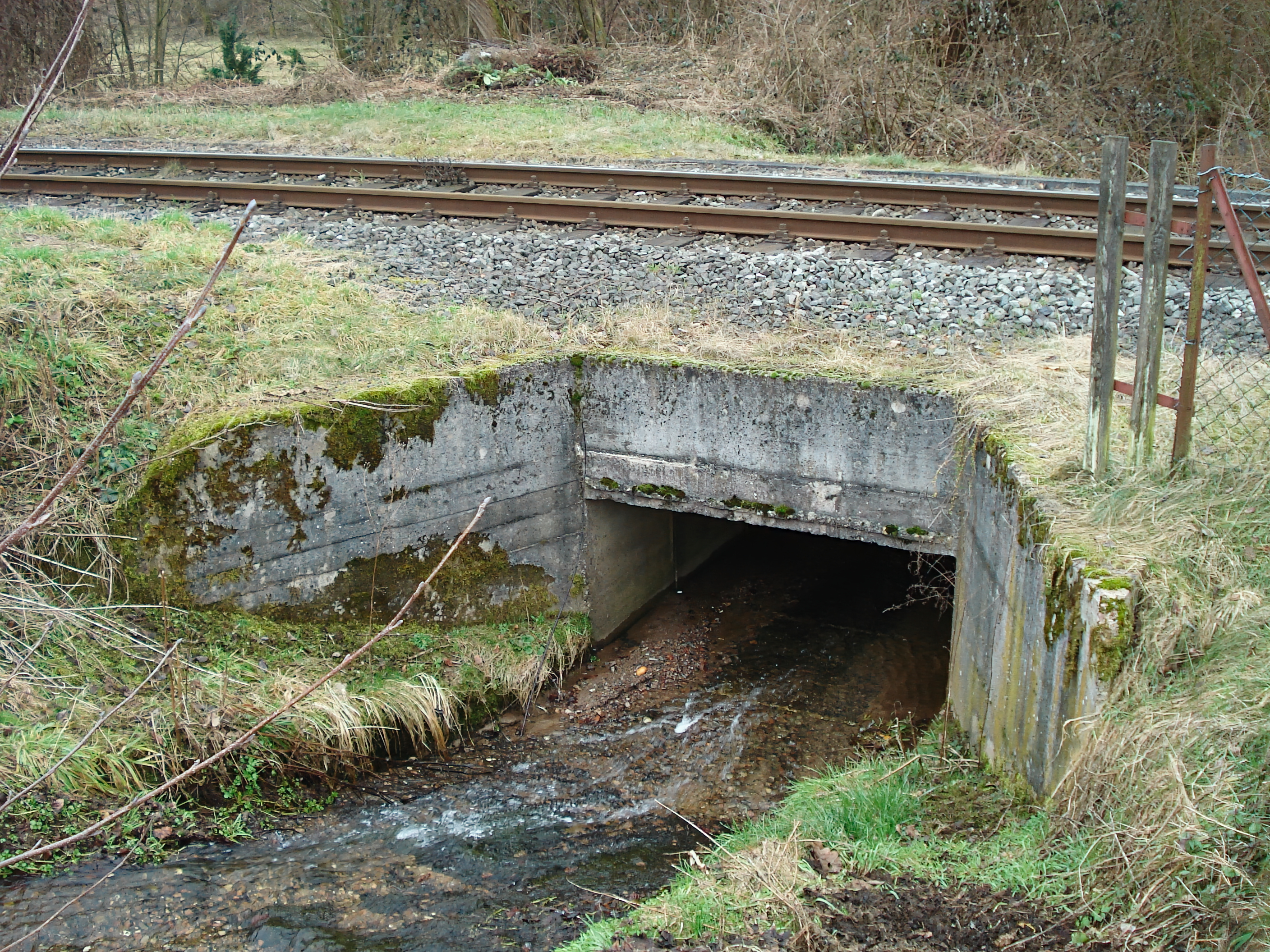 Der Steinbach unterquert die Kahlgrundbahnstrecke